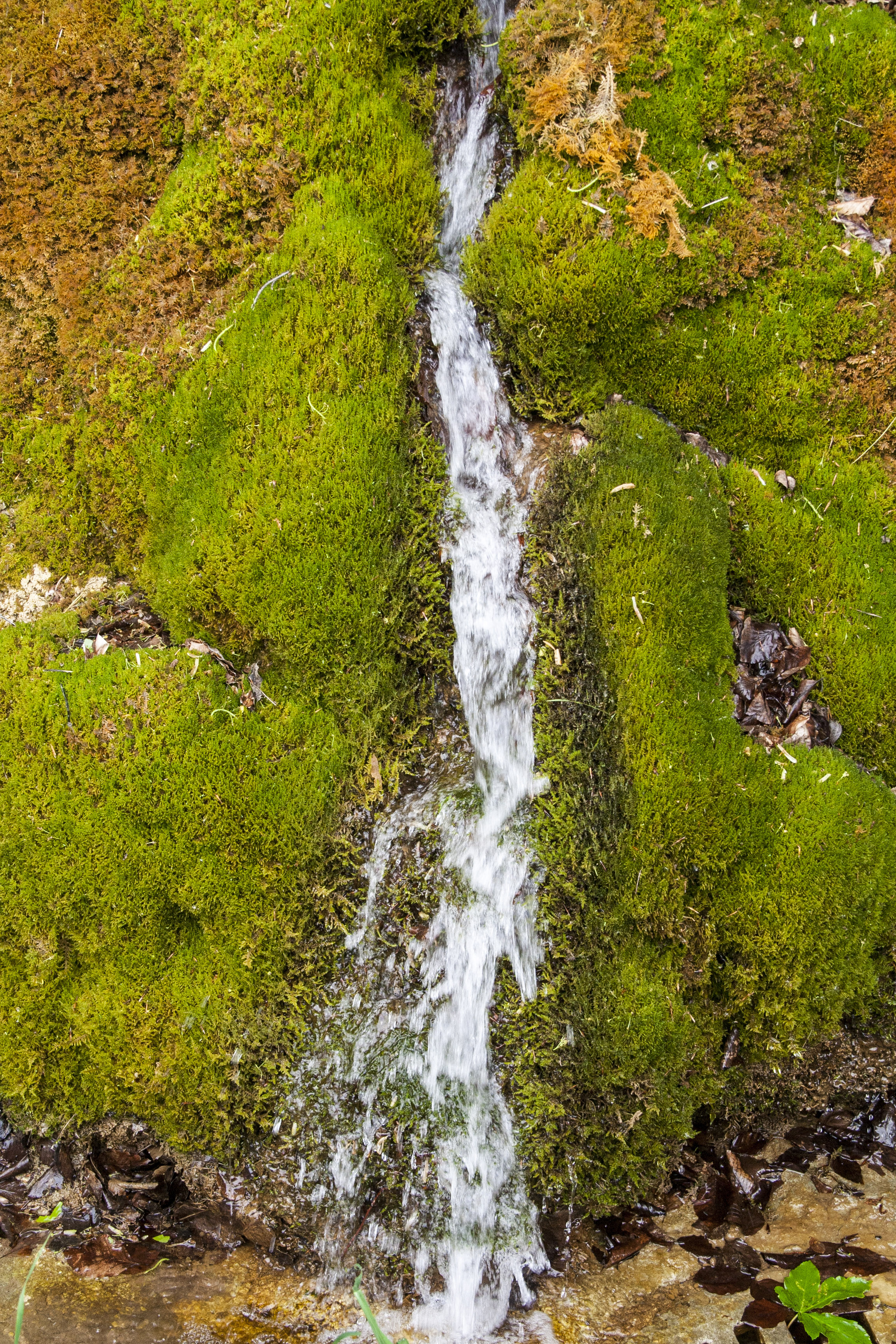 Steinerne Rinne, Thalheim, Happurg, Ausweisung des LSG "Südlicher Jura mit Moritzberg und Umgebung"